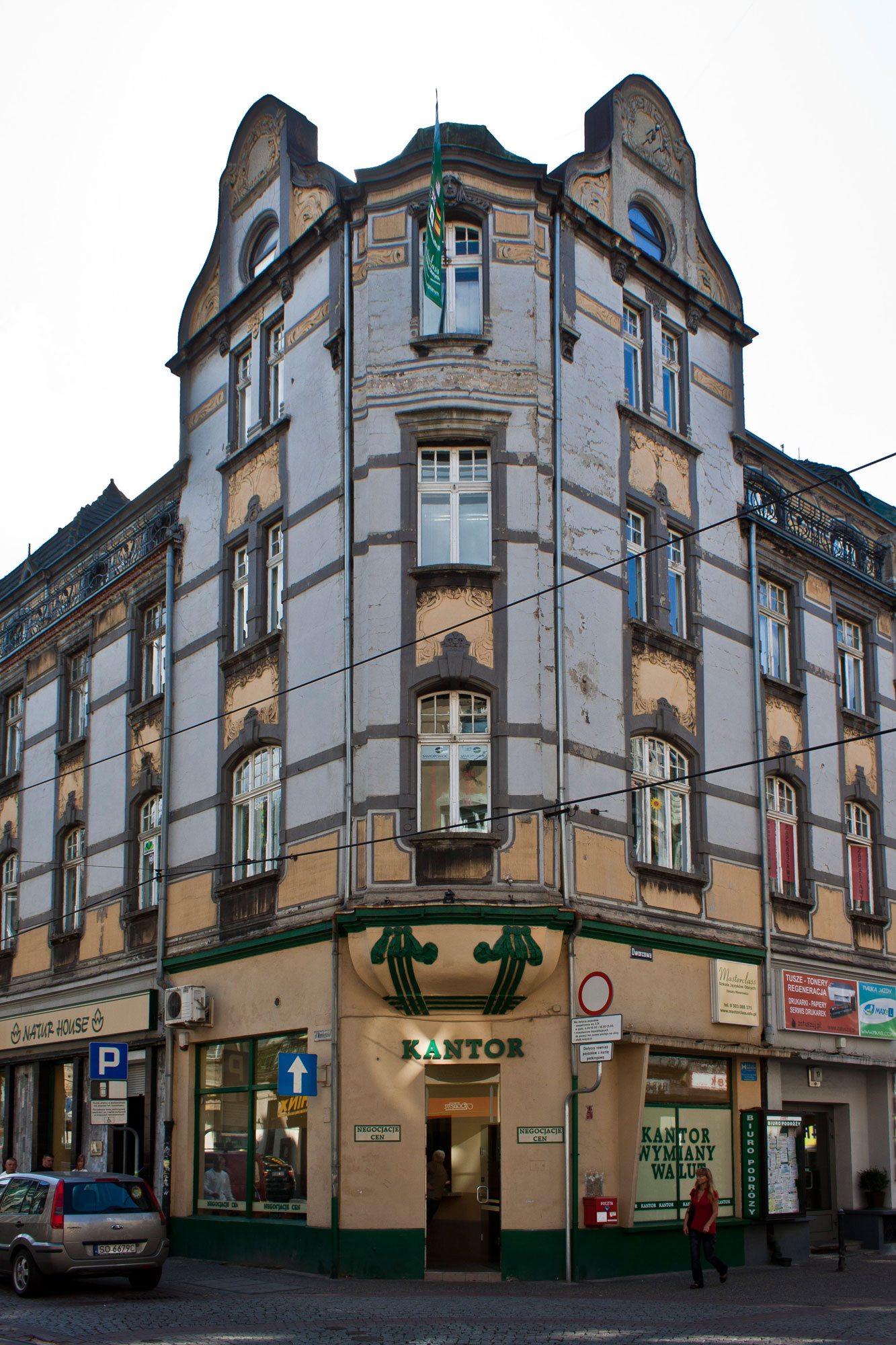 Budynek dawnego hotelu Reihhof ob. budynek mieszkalny ul. Dworcowa 19. Bytom